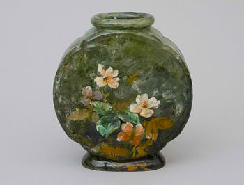 Vase par Ernest Chaplet, XIXe siècle, Manufacture Haviland, Paris, France